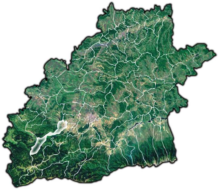 Orlat jud Sibiu.